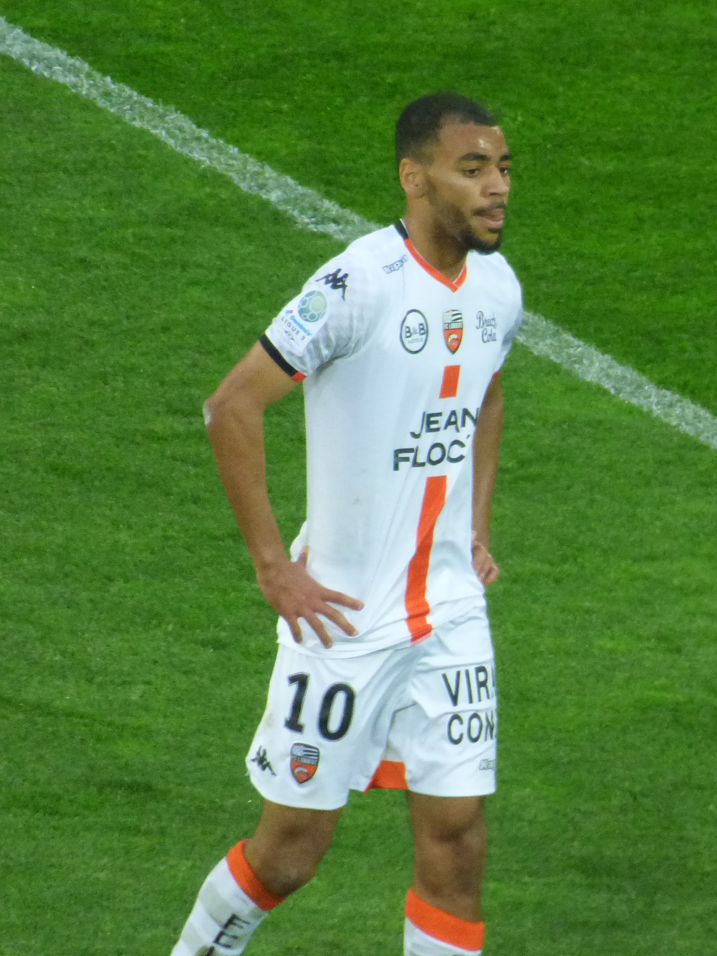 Alexis-Claude Maurice pendant le match RC Lens / FC Lorient, comptant pour la 34ème journée du championnat de France de Ligue 2 de football 2018-2019, le 23 avril 2019, au Stade Bollaert-Delelis.